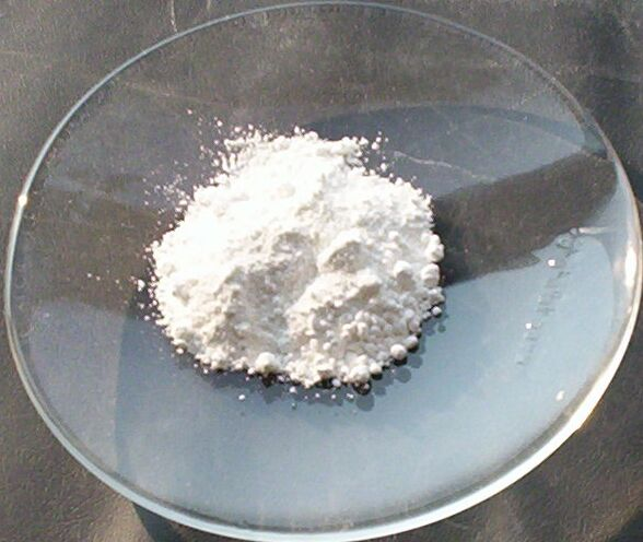 A sample of zinc oxide